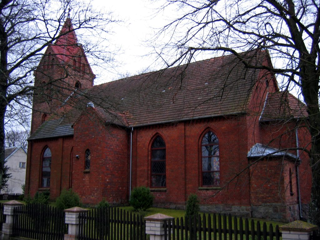 XIII Centry (If i rememer good) church in Nożyno, close to Bytów, Poland. Rafal Konkolewski 2005